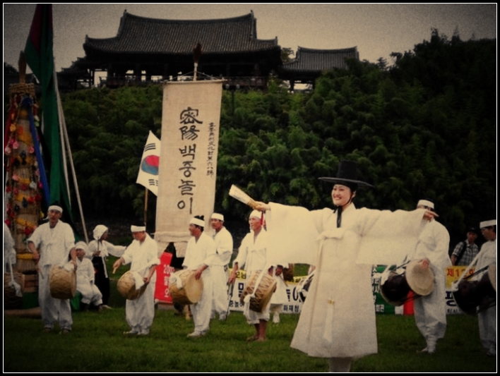 韓國密陽百中（中元節）戲